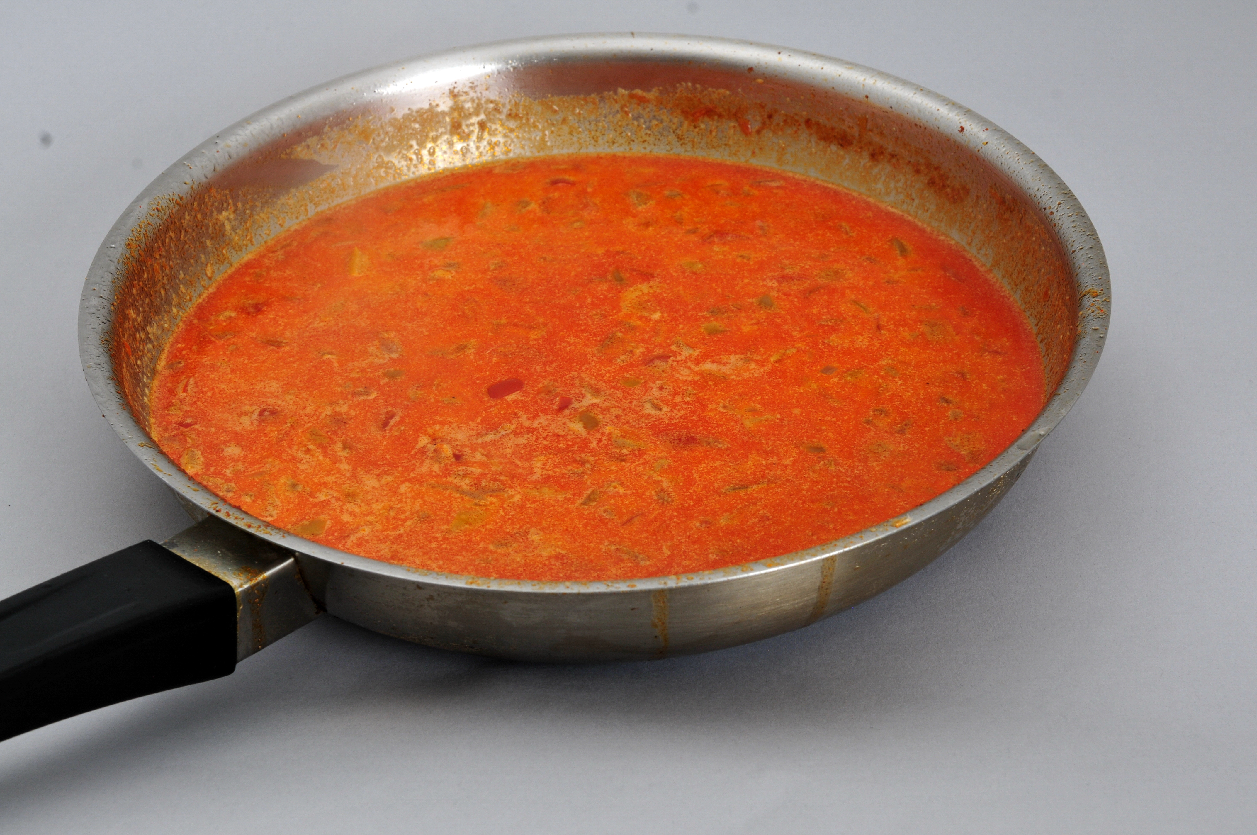 Treffen der Redaktion Essen und Trinken ion Wien